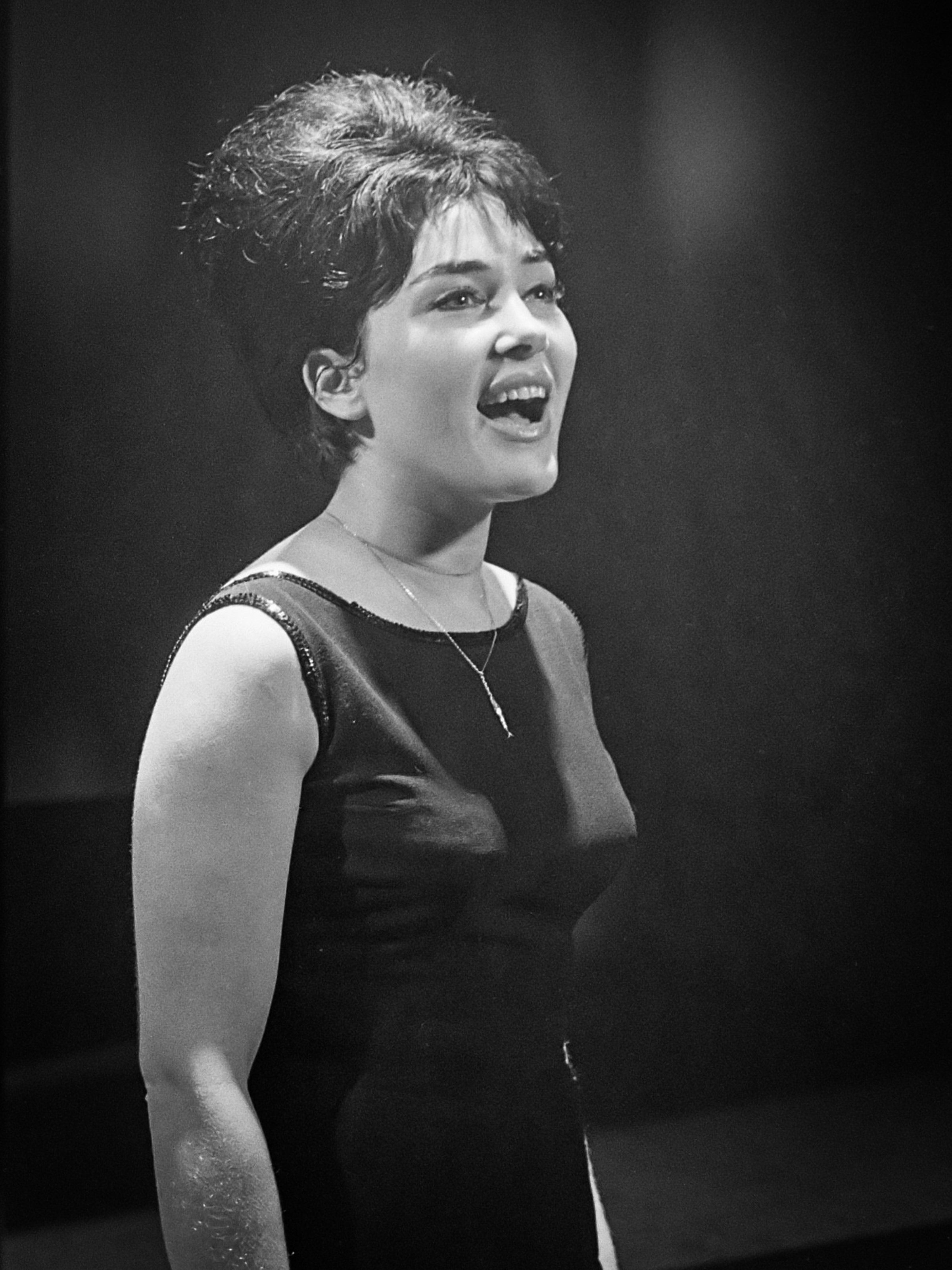 De Avro Music Hall met Rika Zarai en Douglas Ducke op 6 maart. Rika Zarai 12 februari 1963